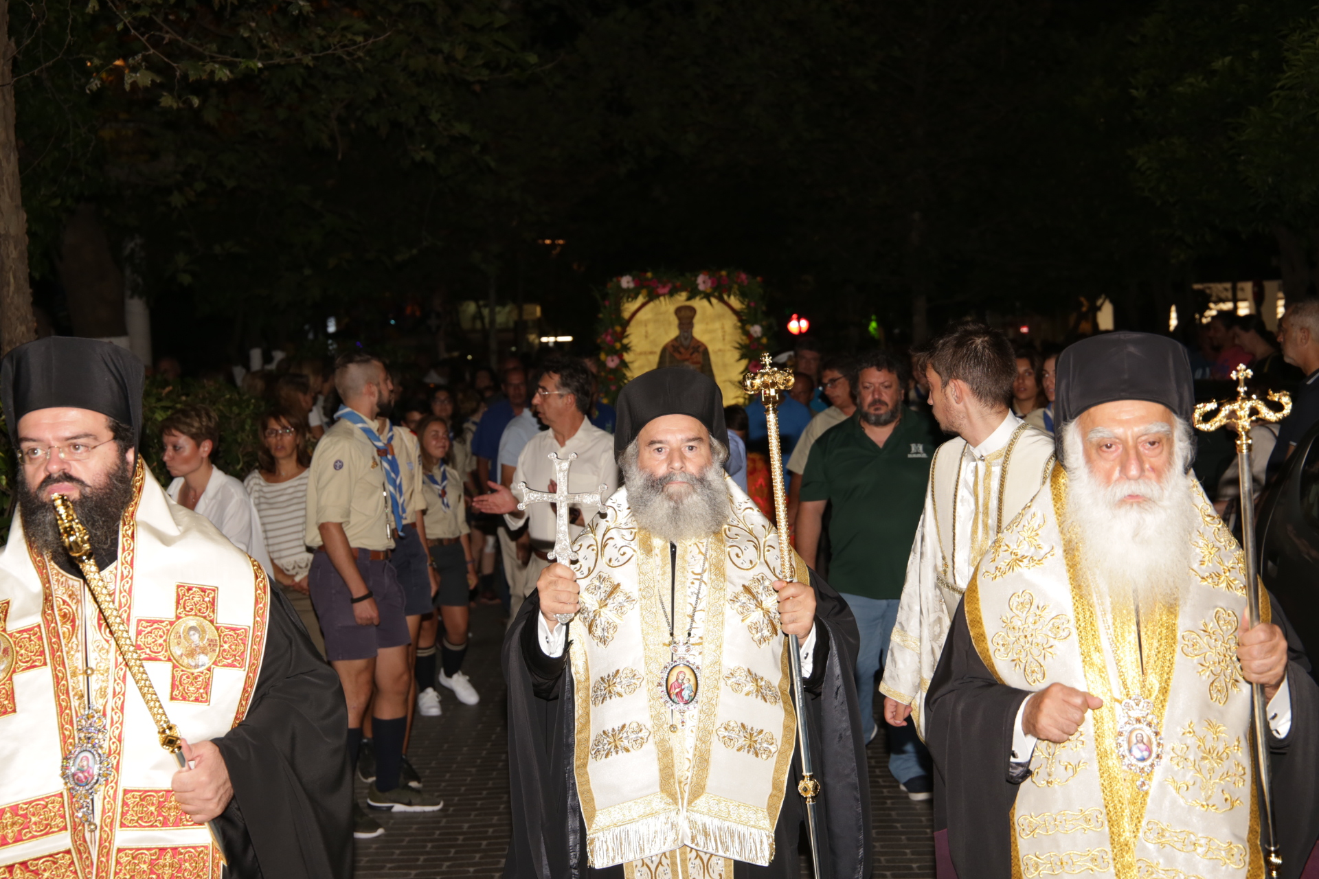 Στιγμιότυπο από ακολουθία τον Άυγουστο του 2018